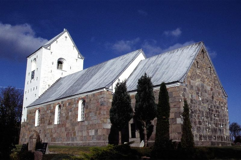 Blenstrup Kirke i Danmark. Blenstrup kirke